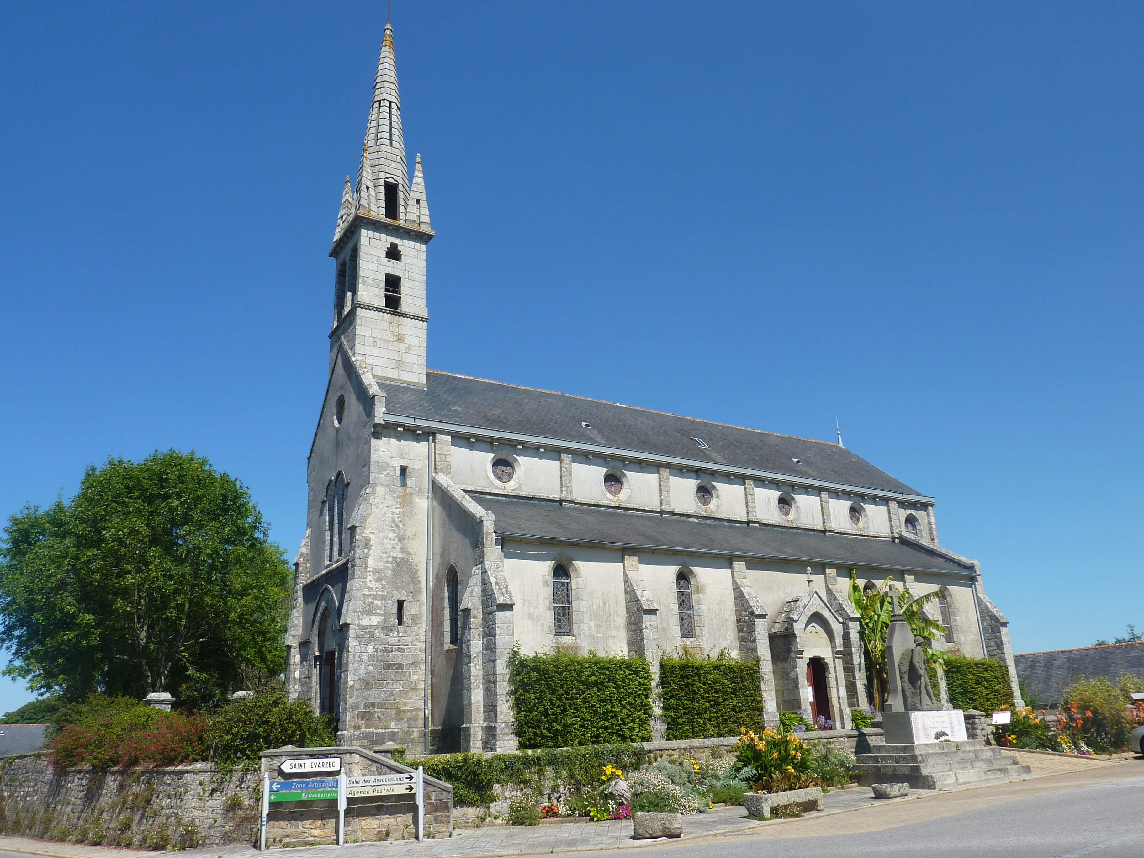 Pleuven : église paroissiale Saint-Mathurin, vue extérieure